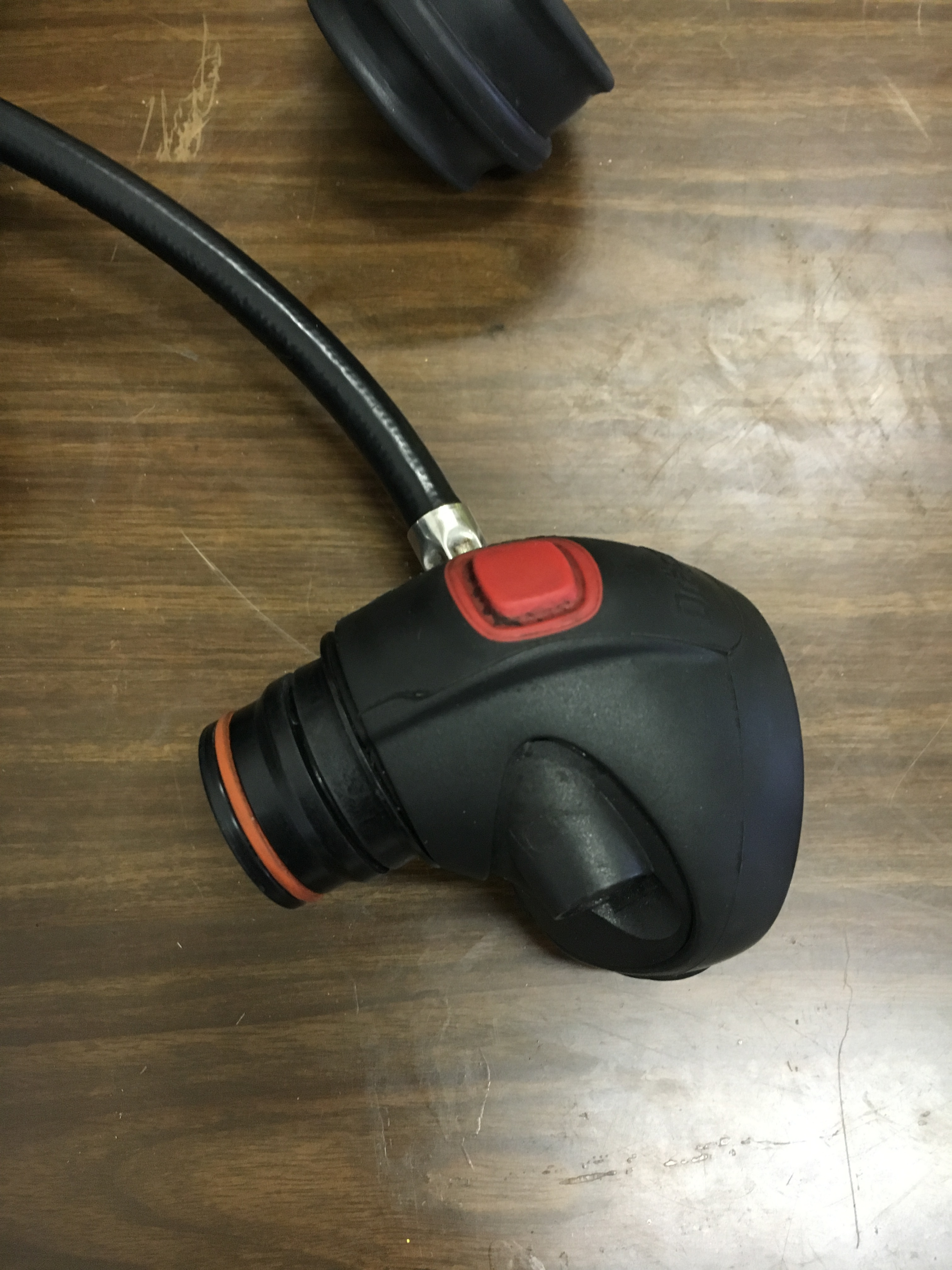 Pljučni avtomat